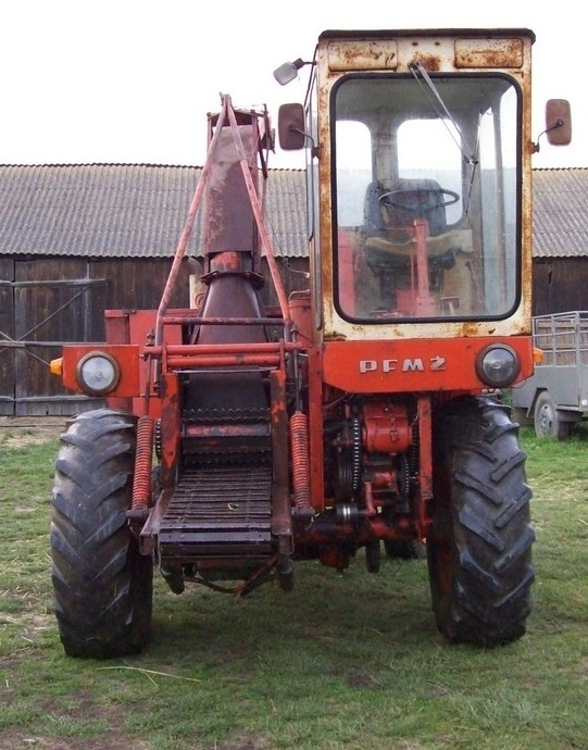 Sieczkarnia Z320 - widok z przodu (1)